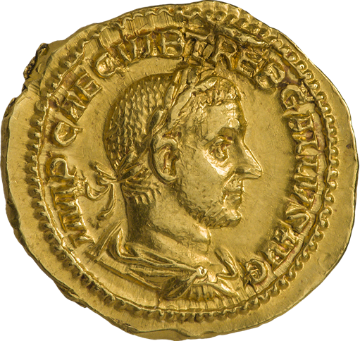 Требониан Галл (251—253). Ауреус. Ок. 251—253 гг. Рим. Аверс. Надпись IMP CAEC VIB TREB GALLVS AVG. Бюст Требониана Галла в панцире и плаще, вправо; на голове лавровый венок.